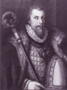 Heinrich von Sachsen-Lauenburg (1550-1585) war ein von der römischen Kirche nicht anerkannter Fürsterzbischof von Bremen (Heinrich III.), Fürstbischof von Osnabrück (Heinrich II.) und von Paderborn (Heinrich IV.). Henry of Saxe-Lauenburg (1550-1585) was Prince-Archbishop of Bremen (as Henry III), Prince-Bishop of Osnabrück (as Henry II) and Prince-Bishop of Paderborn (as Henry IV), elected by the respective chapters and recognised by the emperor, however, not confirmed by the Holy See.